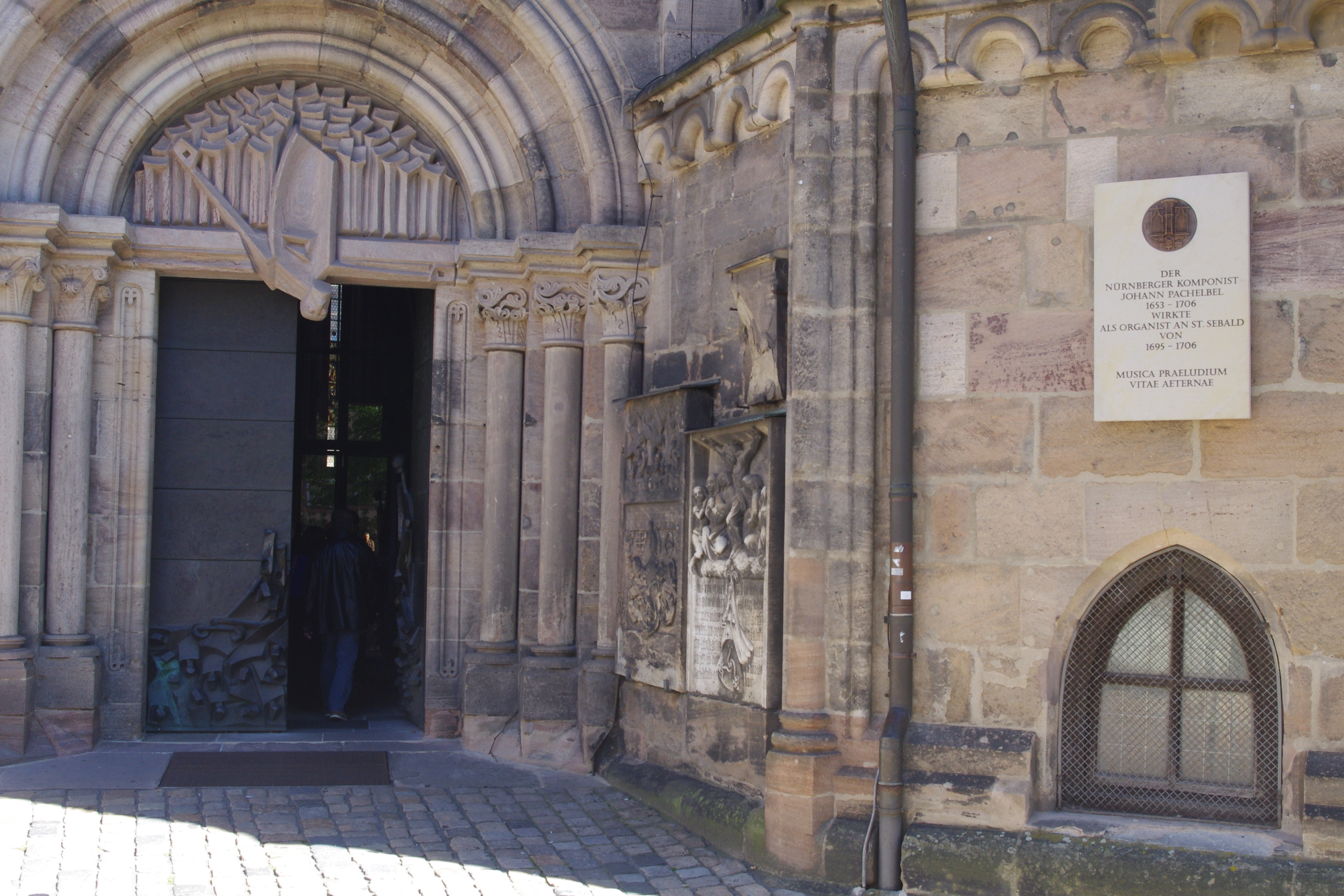 Gedenktafel für das Wirken Johann Pachelbels in St. Sebald und seiner Heimatstadt Nürnberg an der Außenfassade der Sebalduskirche.